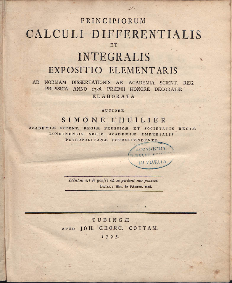 Frontespizio